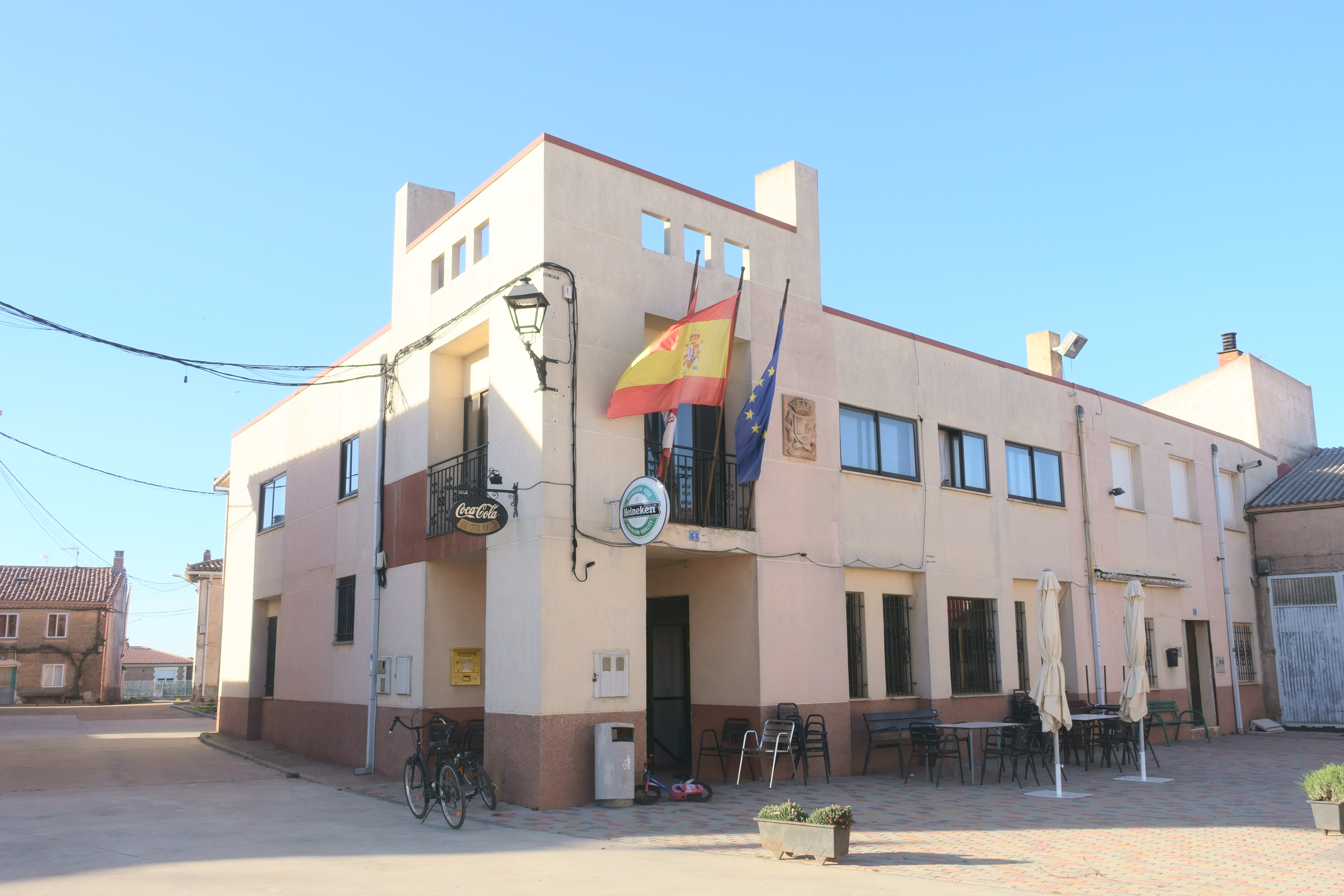 Casa consistorial de Torrecilla del Monte (Burgos, España).